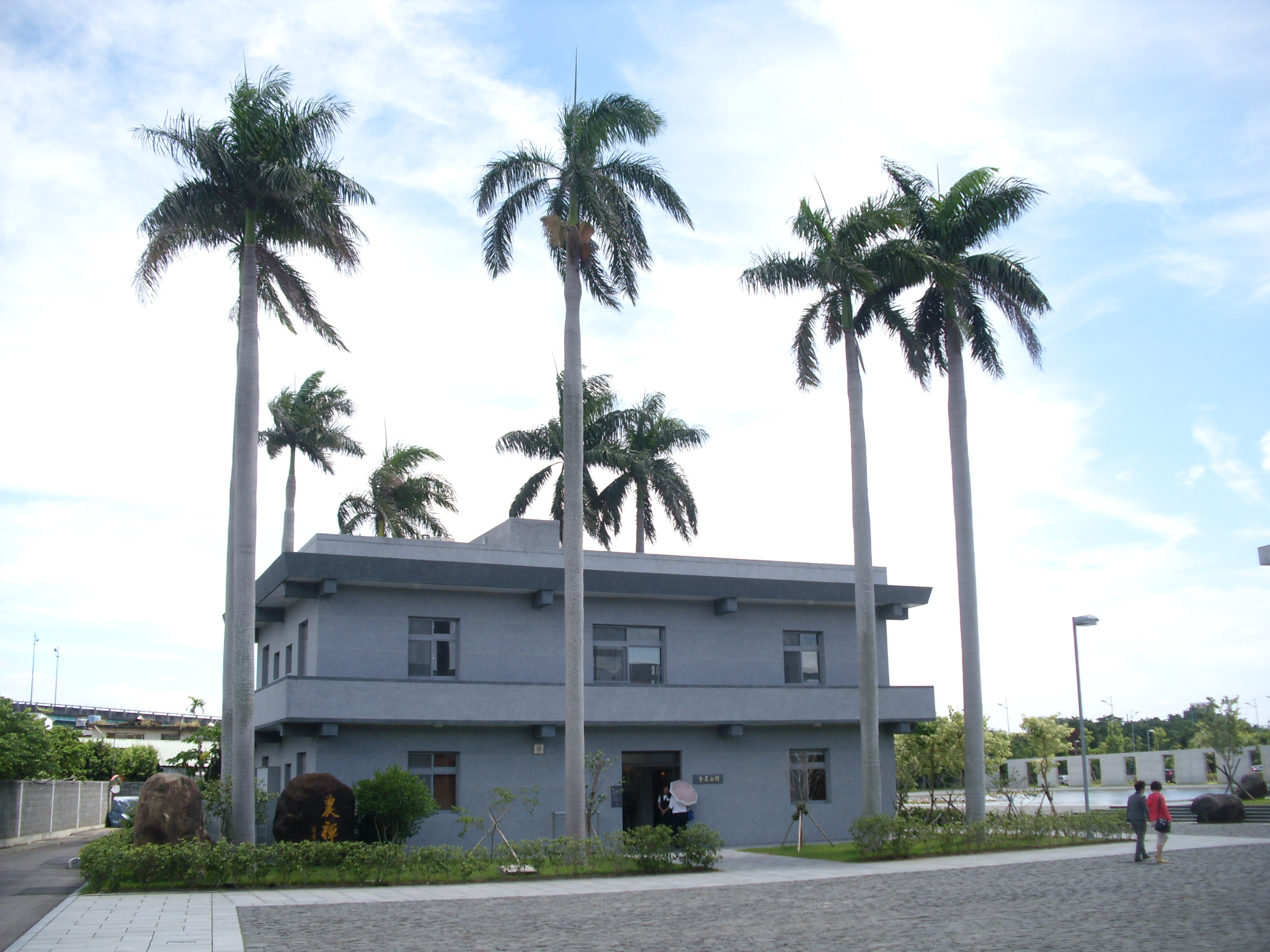 Bân-lâm-gú: 農禪寺，佇臺北北投大業路北爿路邊。